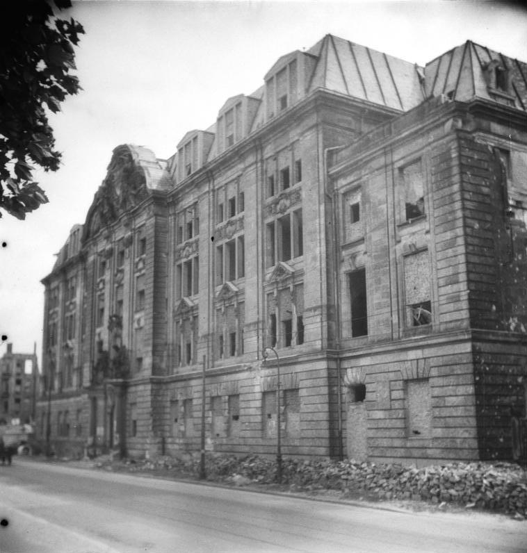 ADN-ZB/Funck Berlin: Das im II. Weltkrieg zerstörte Gebäude der berüchtigten Geheimen Staatspolizei in der Prinz-Albrecht-Straße. Aufn. Juni 1949